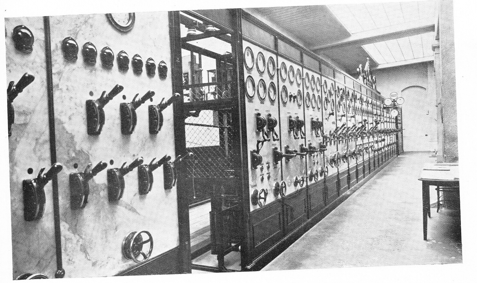 Zapínacie zariadenia